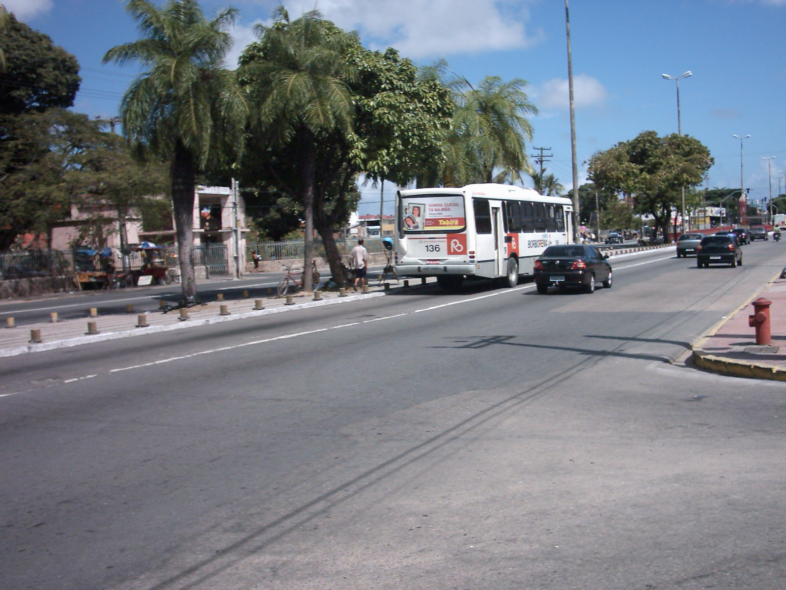 Aspecto da Avenida Caxanga, em Recife, Capital do Estado de Pernambuco, Brasil.